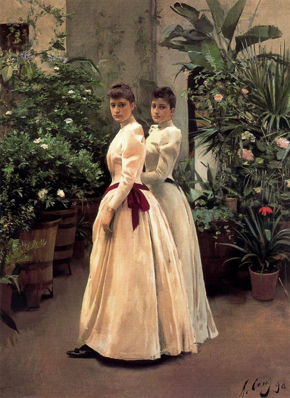 Ramon Casas - Retrat de les senyoretes N.N.